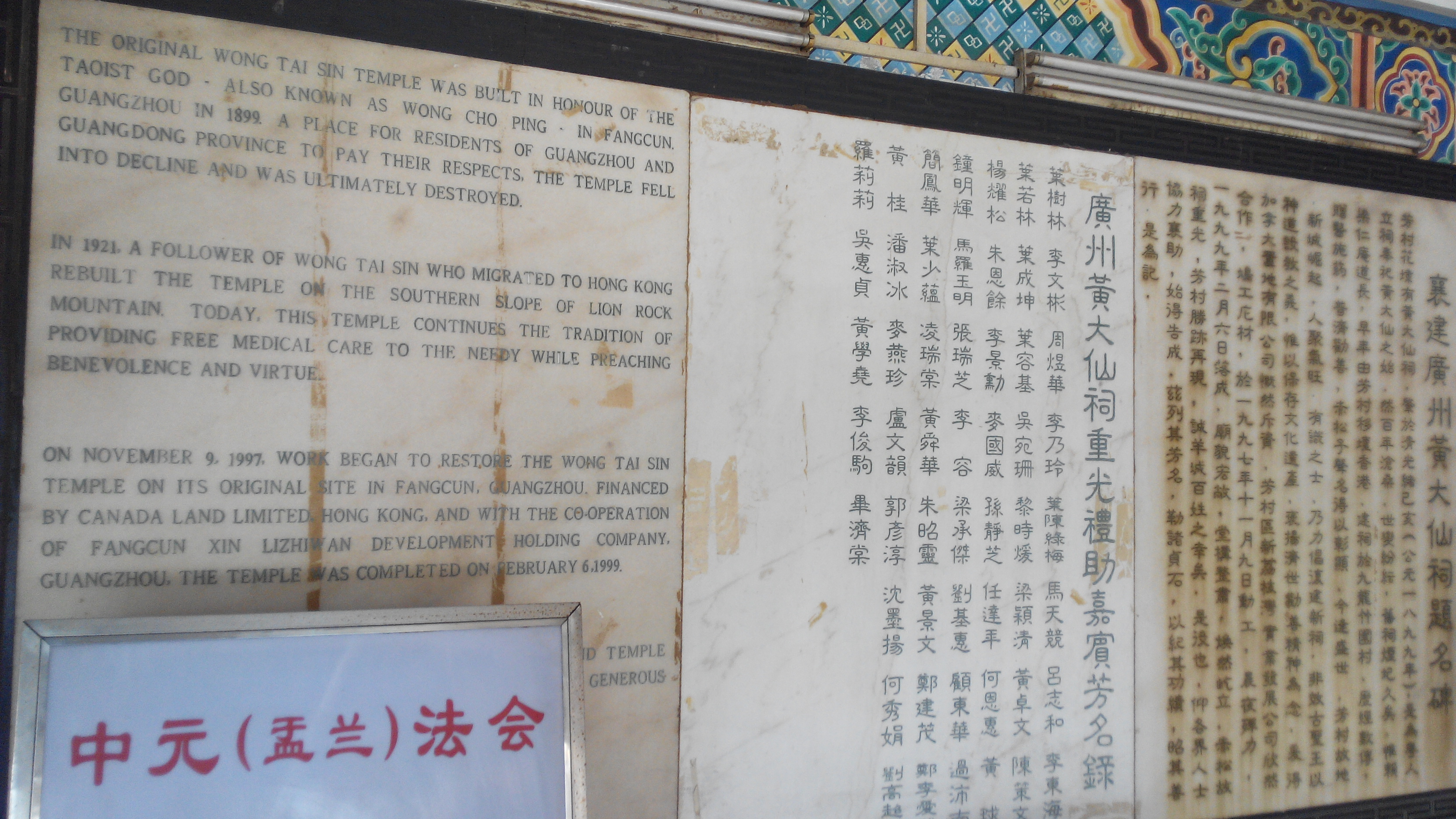 廣州市芳村黃大仙祠。版權說明：使用本相片必須署名，否則CC協議將失效，並追究相應的法律責任。